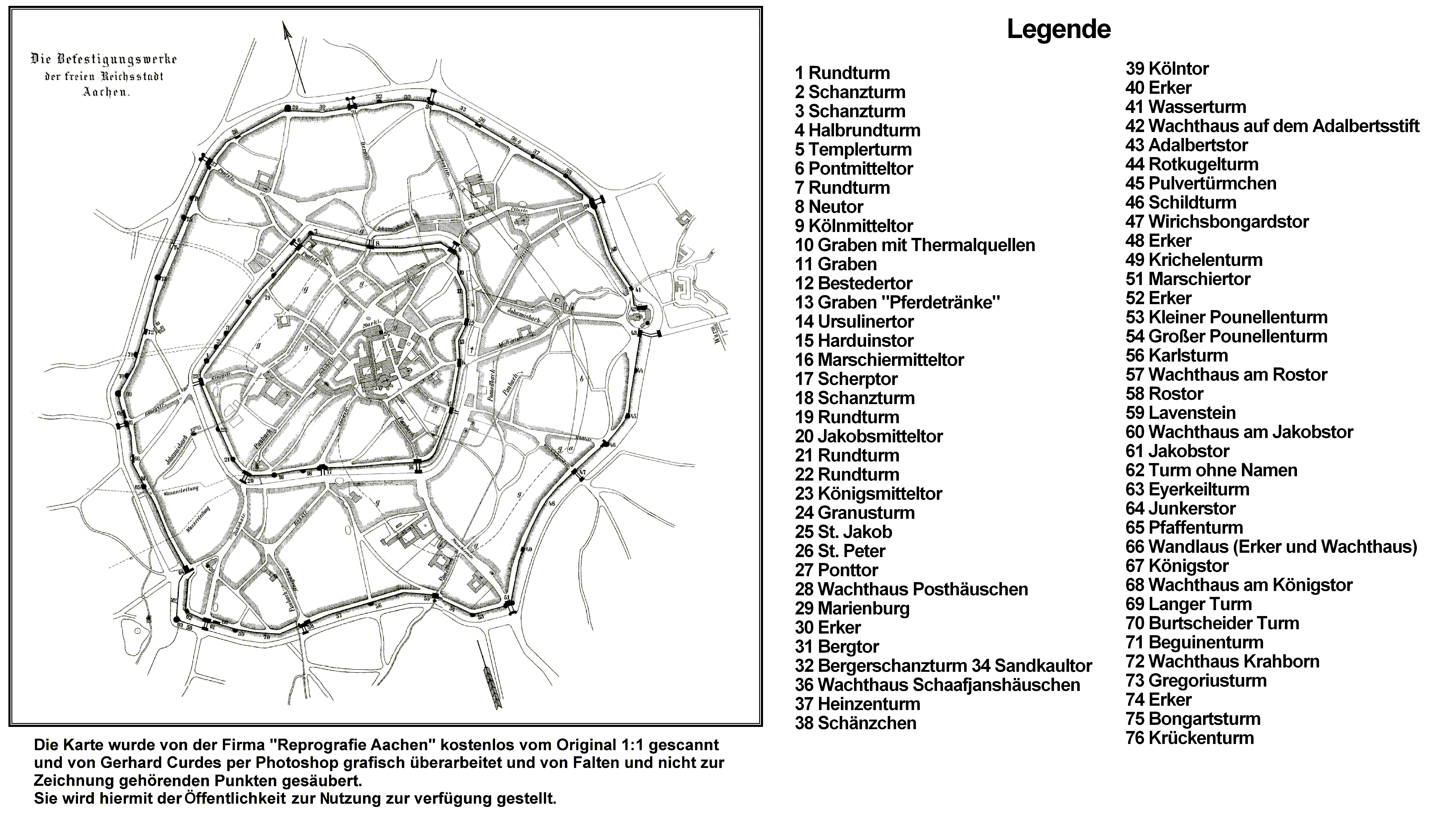 Eine Bearbeitung der Planskizze zur Schrift: Carl Rhoen, Die Befestigungswerke der freien Reichsstadt Aachen